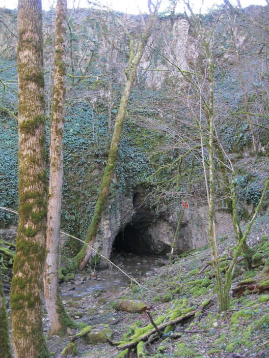 Photo du porche d'entrée du gouffre du Saut de la Pucelle situé à la limite des communes de Rignac, Rocamadour et Gramat dans le Lot, France.